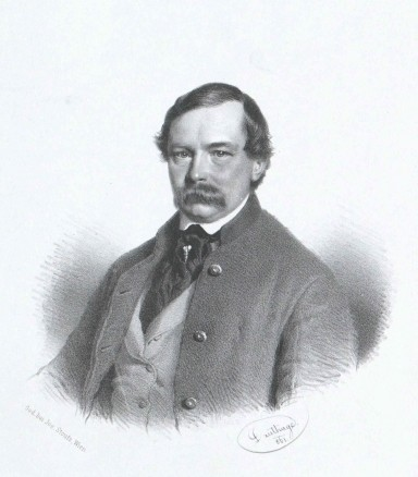 Werner Friedrich von Riese-Stallburg (1815 - 1887), Rakouský šlechtic a politik.